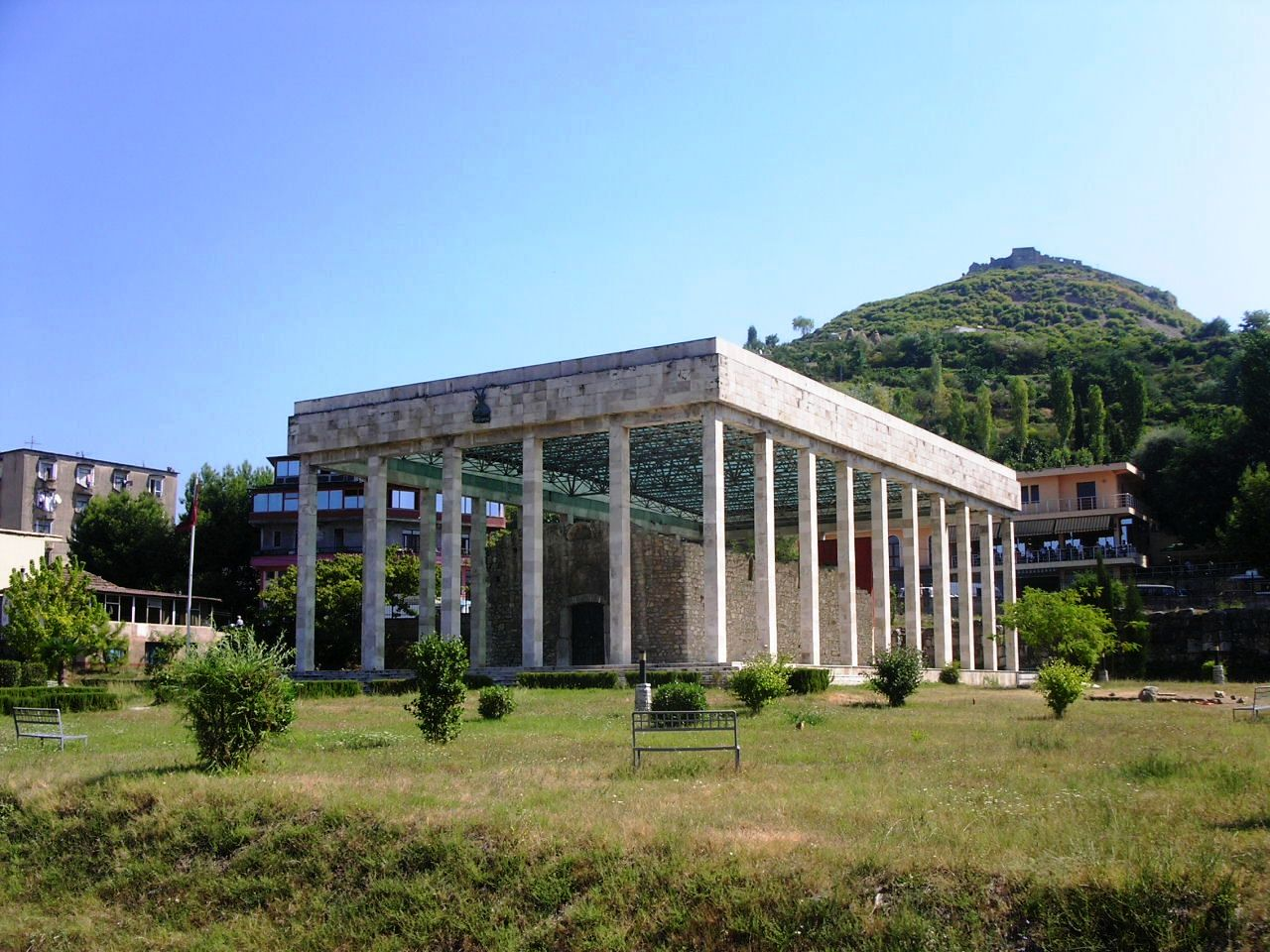 lezha varri i Skenderbeut The grave of Skanderbeg in Lezha